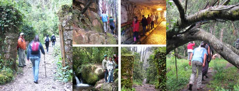 Quebrada la vieja reserva del acueducto de Bogotá, abierta de Lunes a Sábado de 5:00am a 9:00am